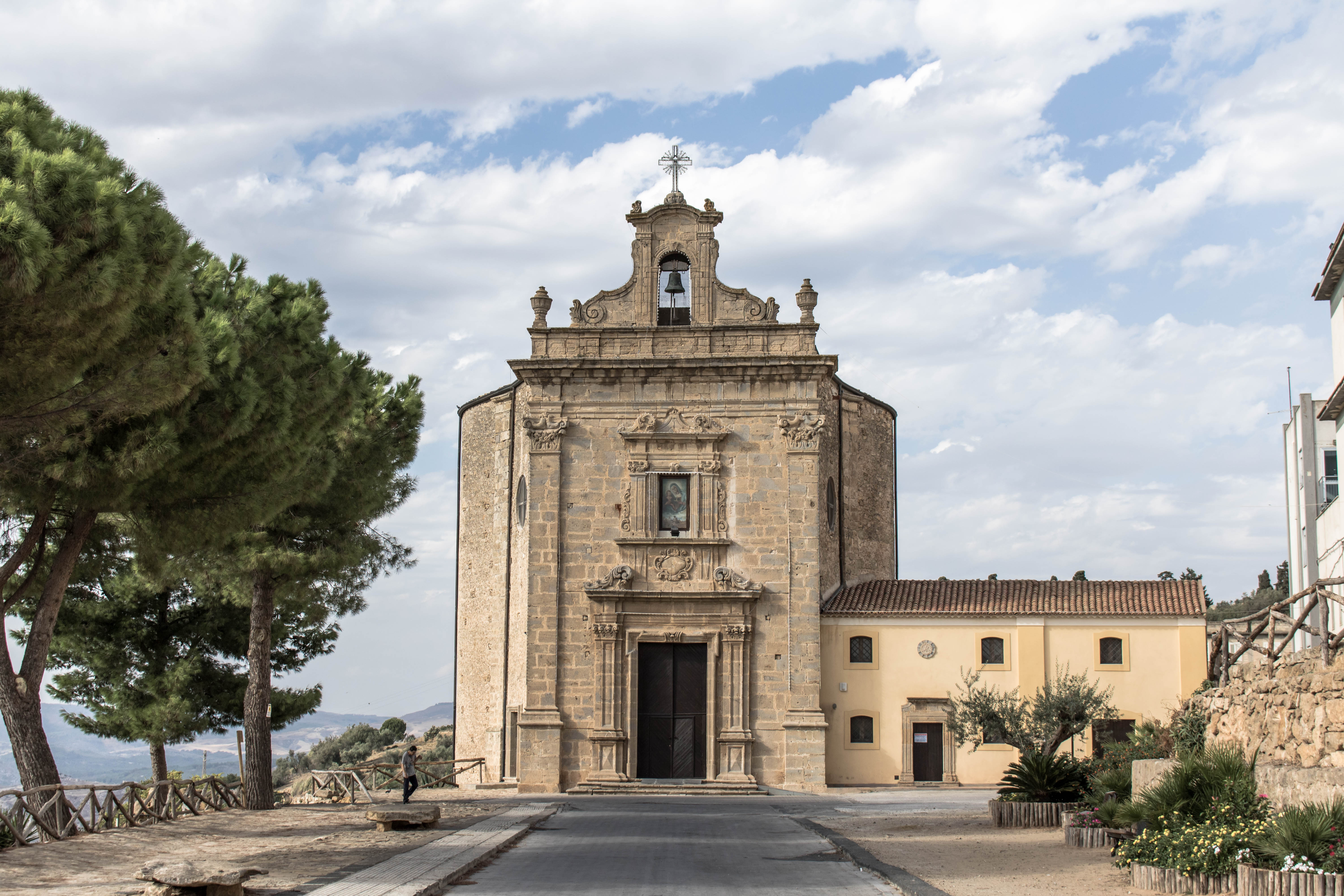 Chiesa di Maria Santissima del Bosco This is a photo of a monument which is part of cultural heritage of Italy.